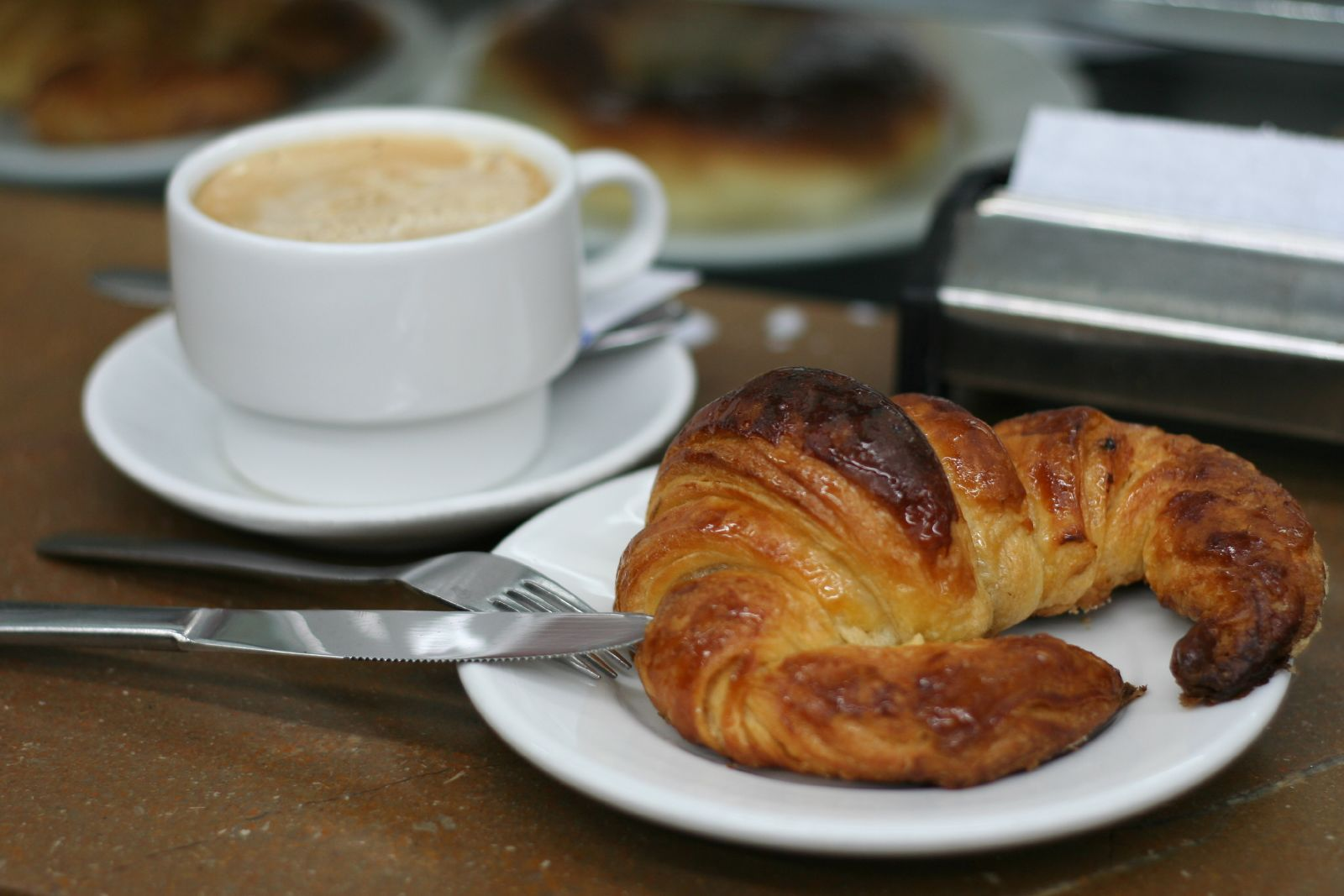 Un café con leche y un cruasán.